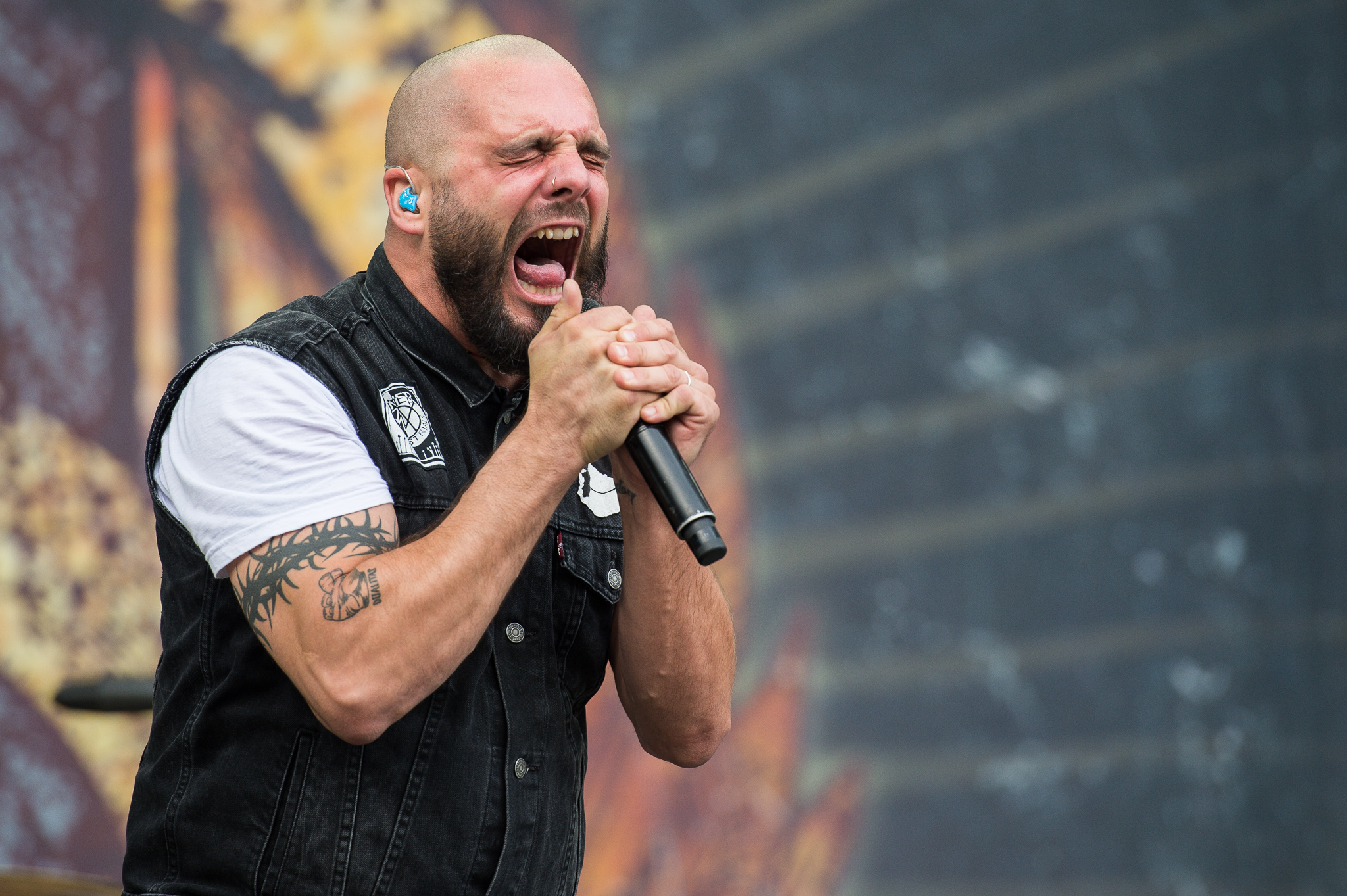 ARGO-Konzerte,Beck's Park Stage,Festival,Jesse Leach,Killswitch Engage,Konzert,Livekonzert,Livemusik,Musik,RiP,Rock im Park 2016